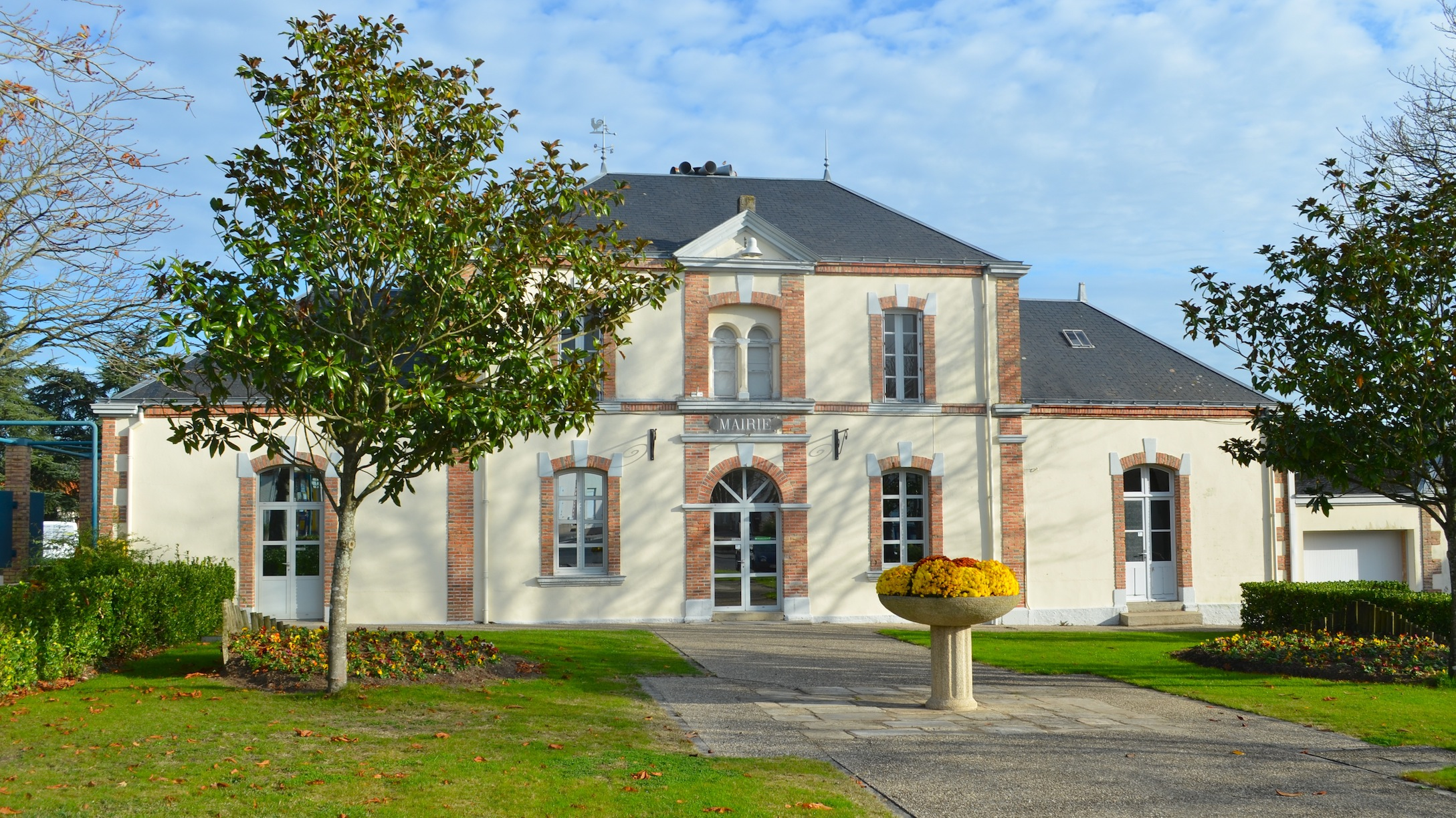 Mairie - La Garnache (Vendée)